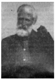 Archivio Gazzetta del Popolo (sez. I, 1161)